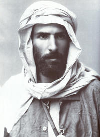 Pietro Savorgnan di Brazza, explorer of Congo (Rome 1852- Dakar 1905)